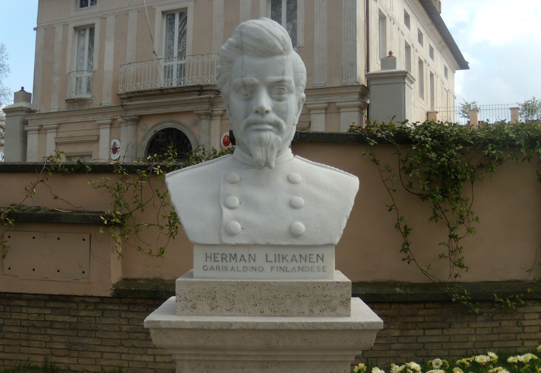 Busto restaurato di Herman Liikanen (1835-1926), garibaldino proveniente dalla Finlandia